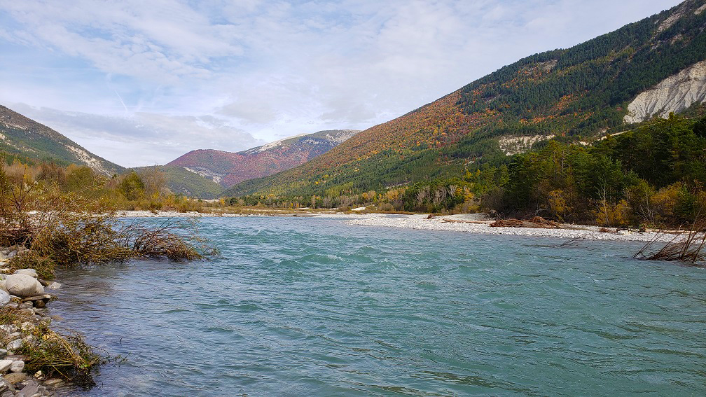 Le Verdon en amont de Saint-André-les-Alpes. Avant de recevoir les eaux de l'Issole.